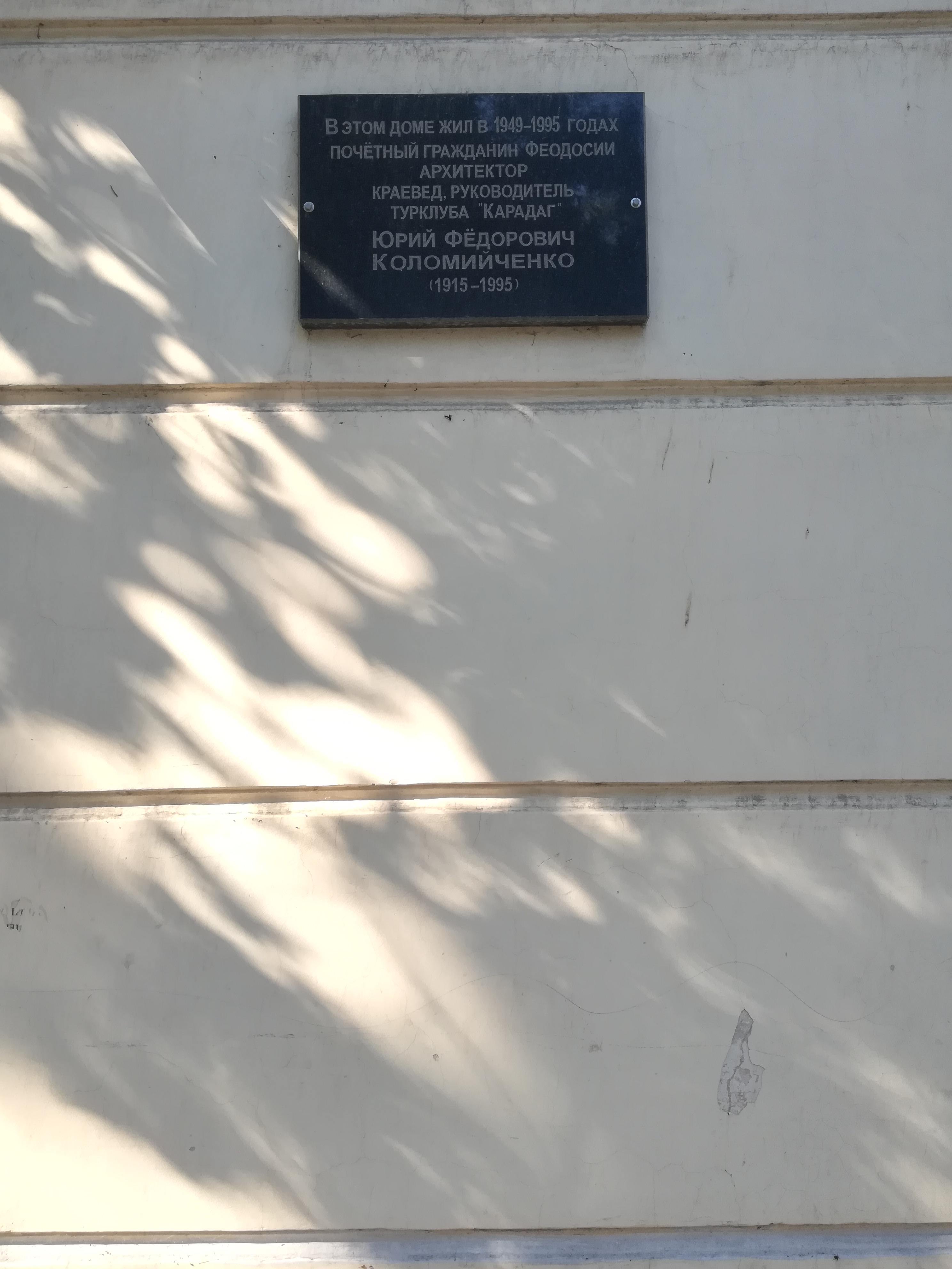 Улица в Феодосии